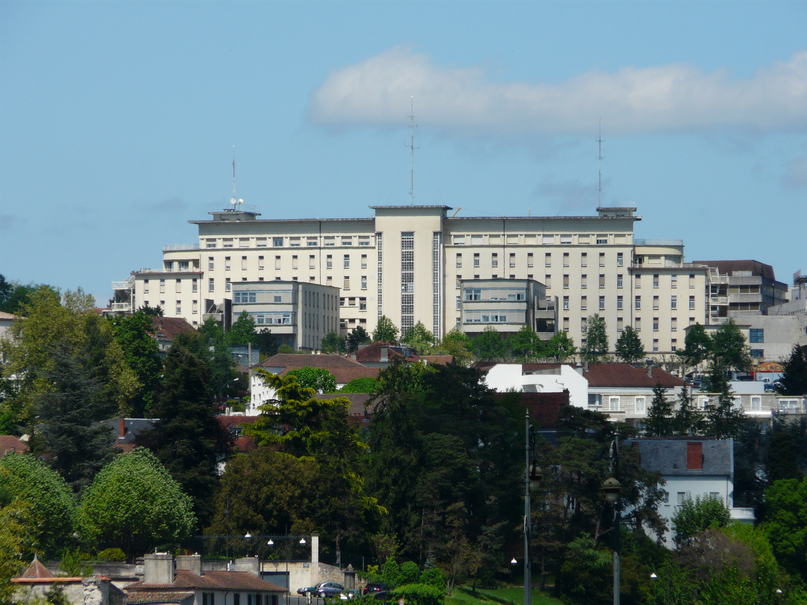 L'hôpital de Périgueux, Dordogne, France.